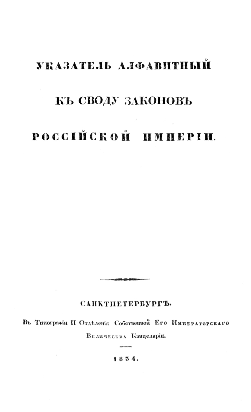 Свод законов. Алфавитный указатель